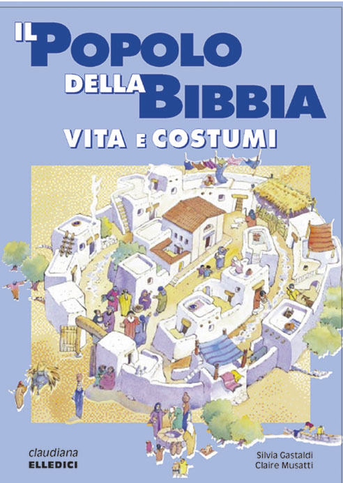 Copertina di Il Popolo della Bibbia, Torino, Claudiana, 2000